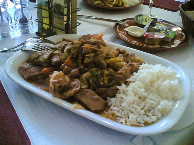 Feijoada à transmontana, um prato do norte de Portugal (a dish from northern Portugal)